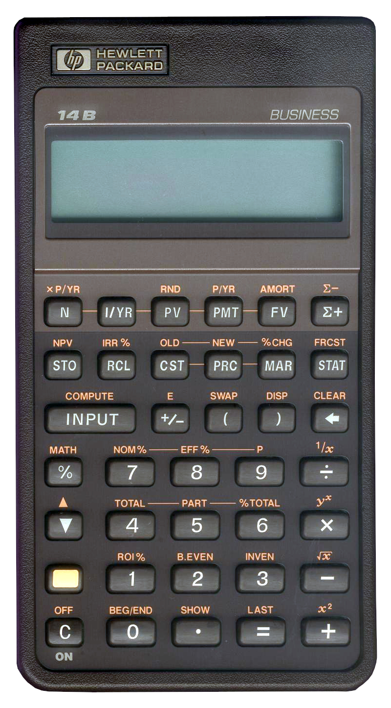 HP-14B - Kalkulator zeskanowano skanerem płaskim.